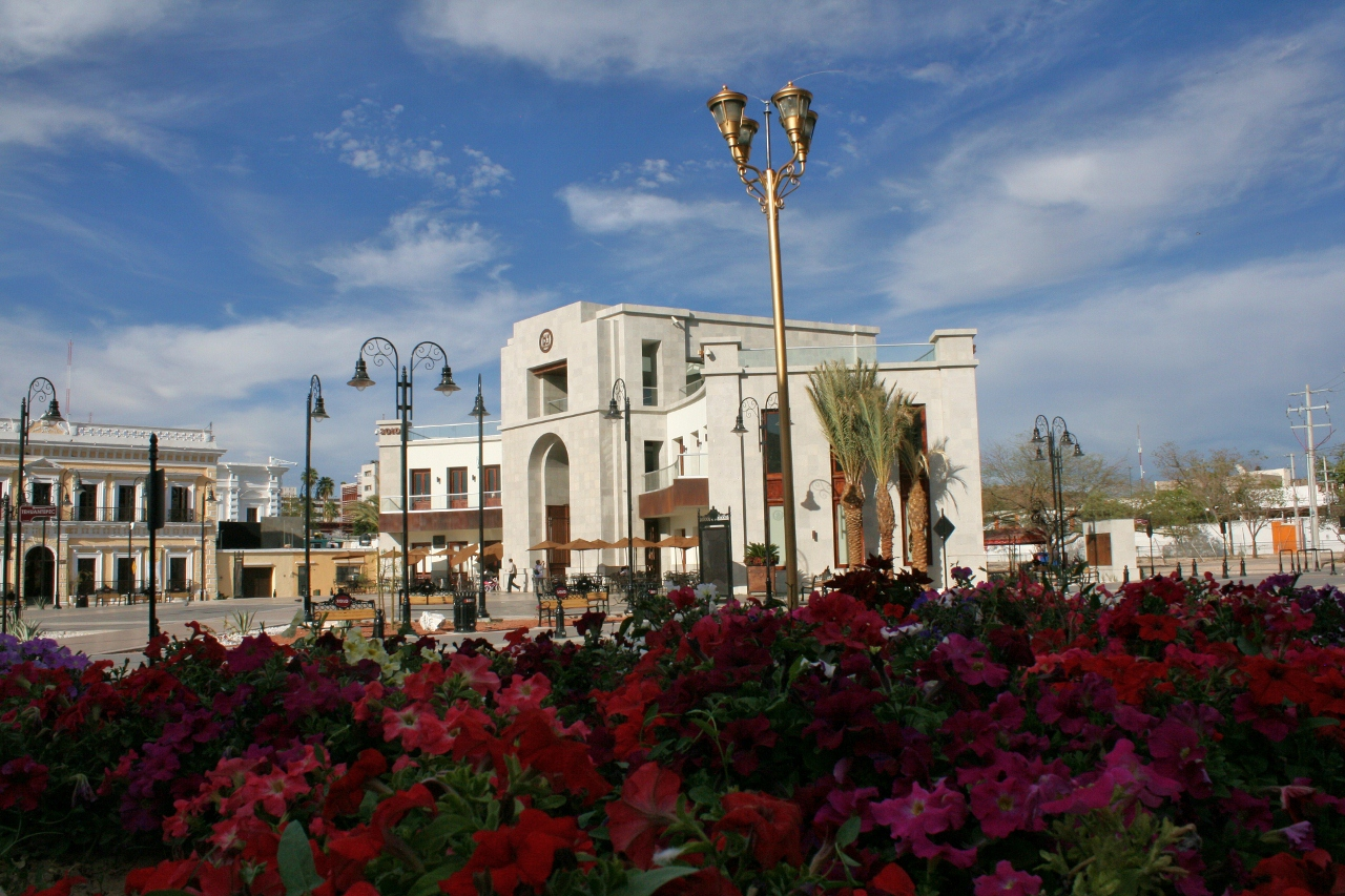 Plaza Bicentenario in Hermosillo, SON, Mexico